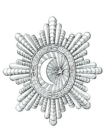 Ster 1800 Turkije - Etoile de l'Ordre du Croissant